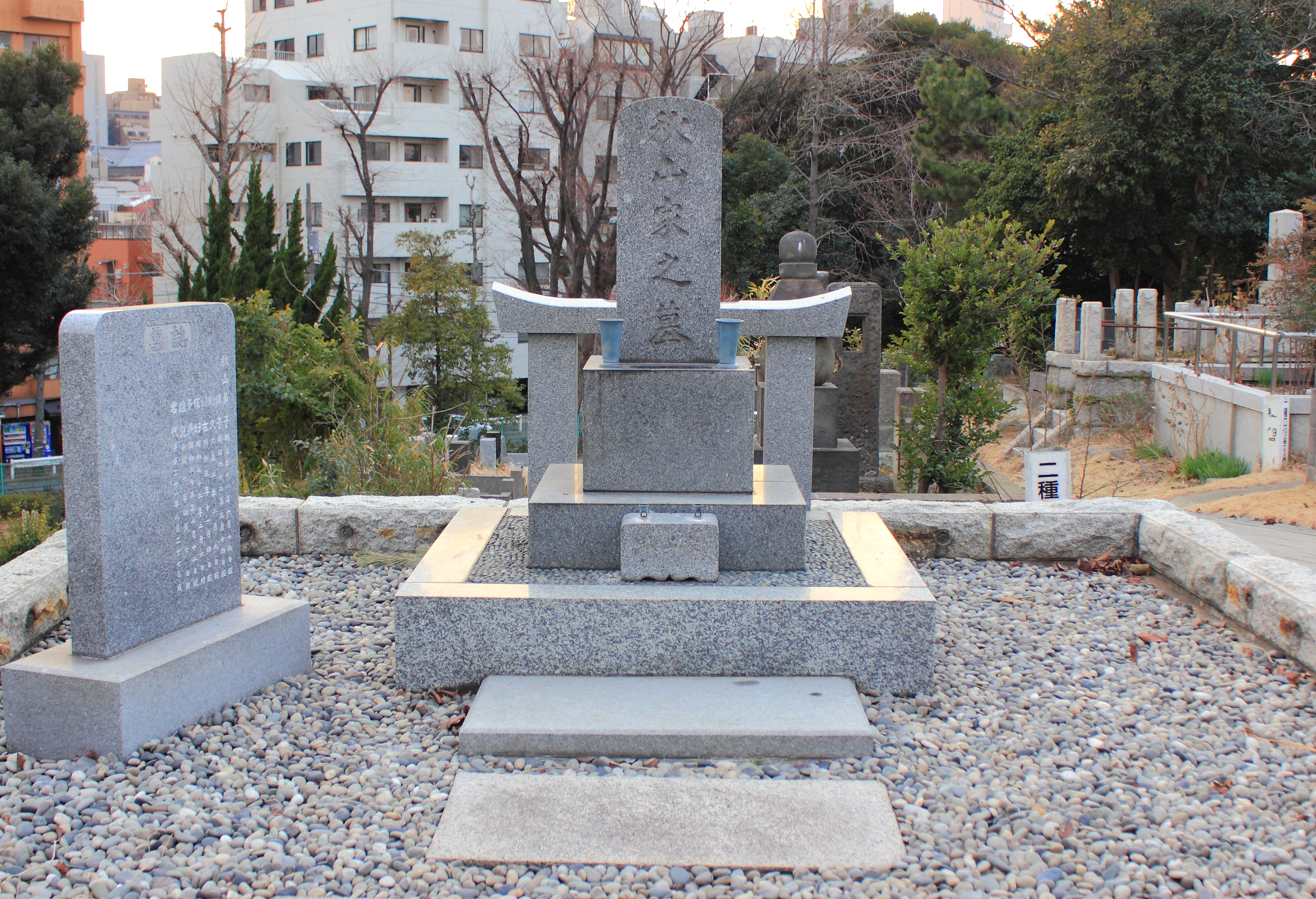 秋山好古の墓（青山墓地・東京都港区）